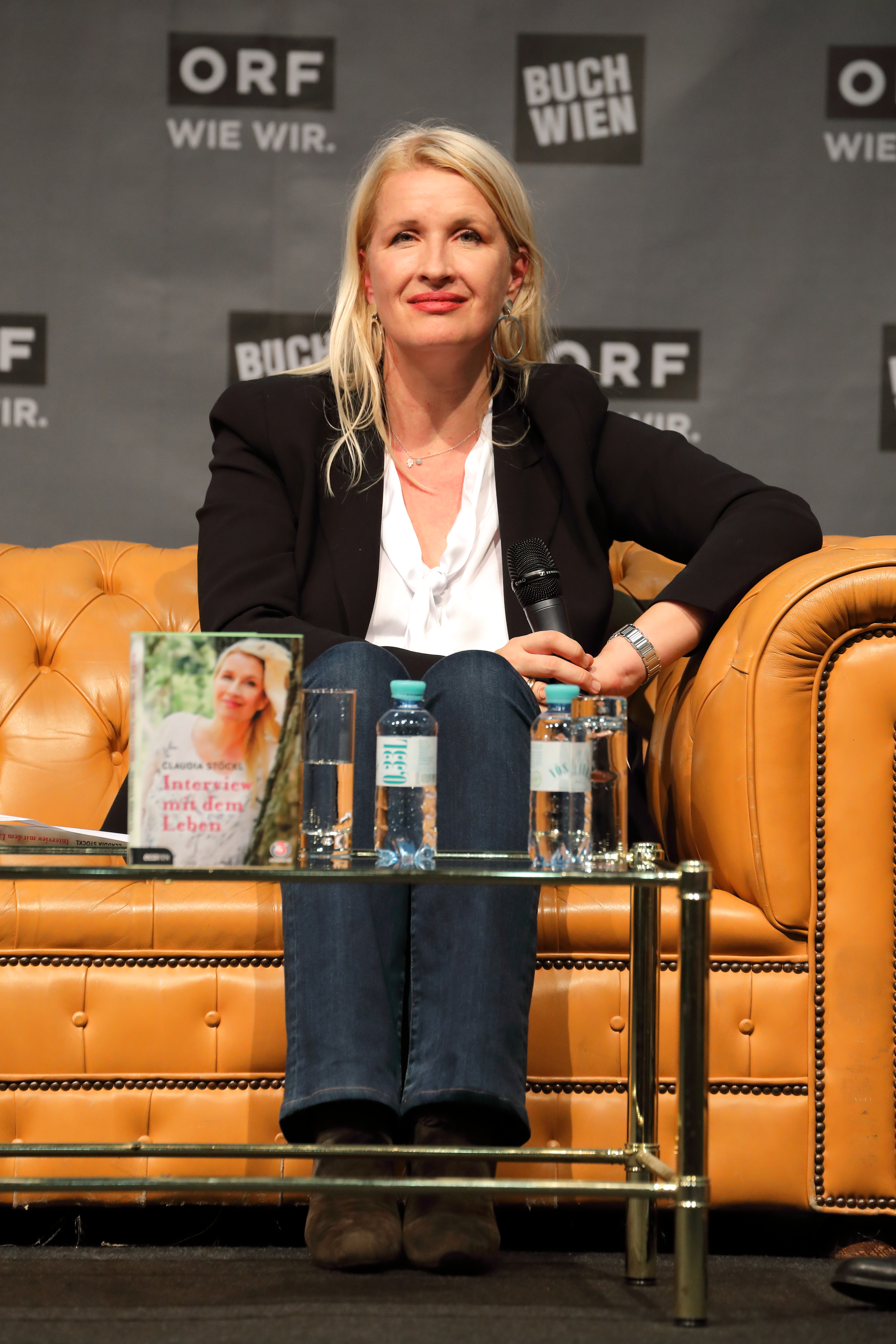 Die österreichische Radiomoderatorin Claudia Stöckl bei der Präsentation ihres Buches „Interview mit dem Leben“ auf der ORF-Bühne der Wiener Buchmesse 2018.